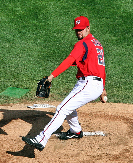 Esteban Loaiza